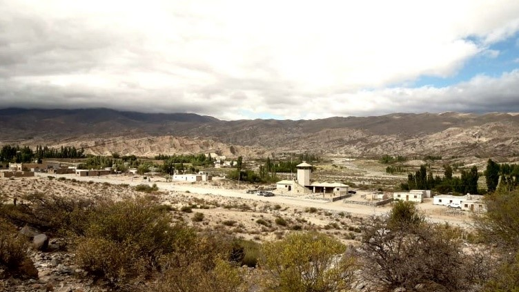 Vista del Valle El Bolson